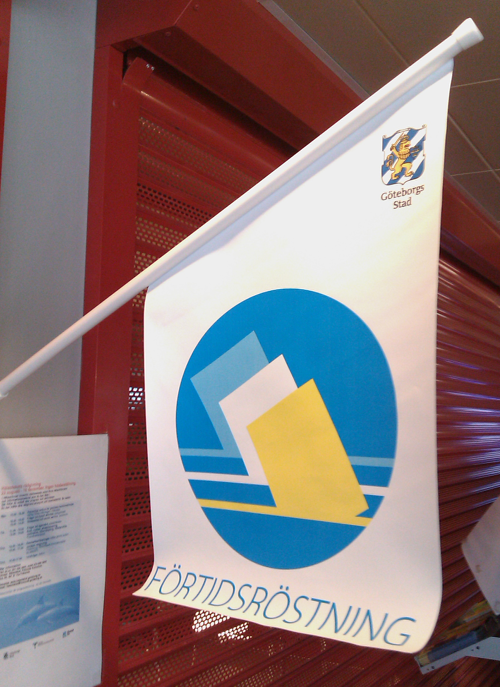 Flagga utanför förtidsröstningslokal i Västra Frölunda, Göteborg.